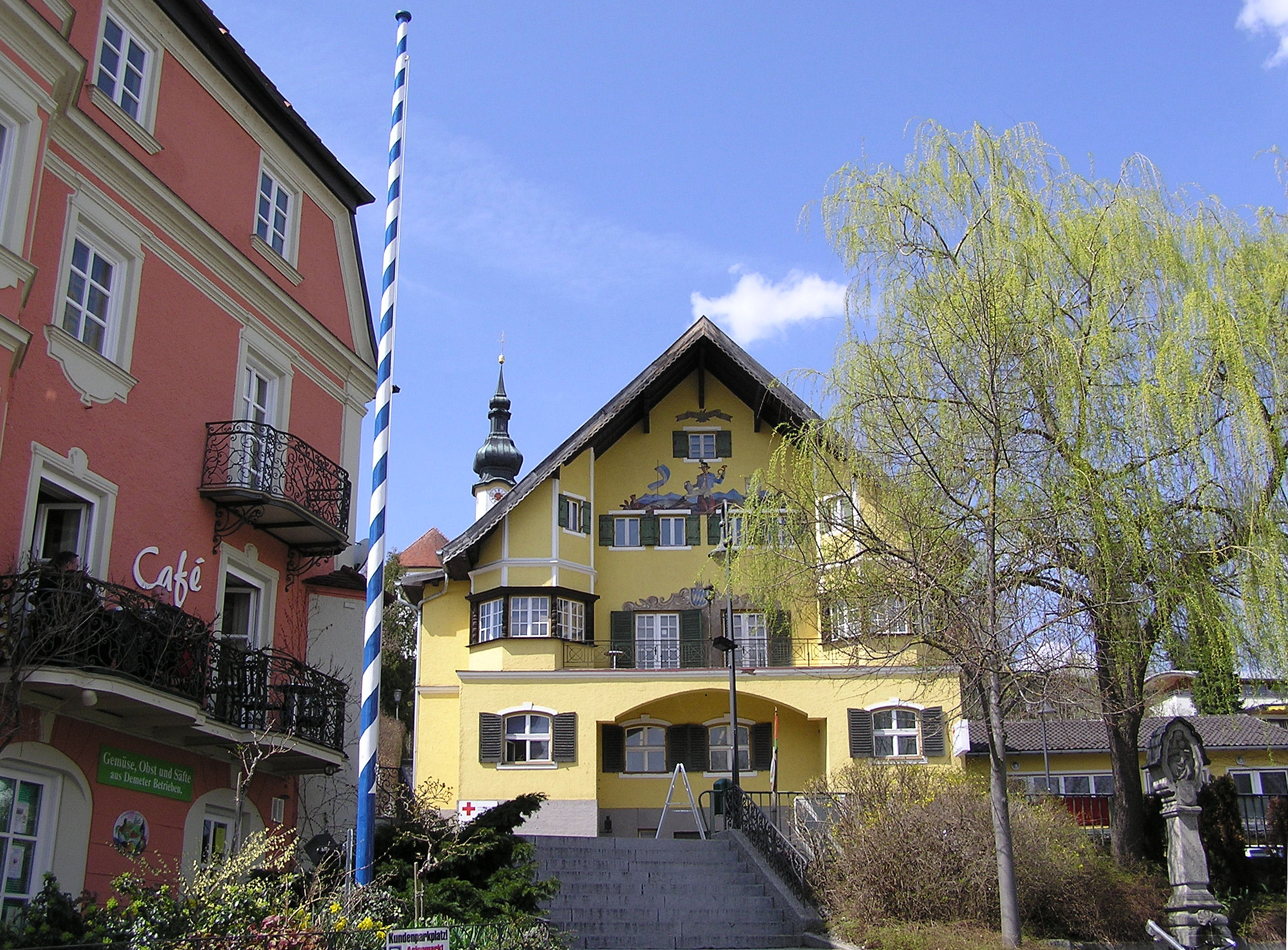 Starnberg, Achheimviertel, Gebäude aus der Zeit um 1900. Rechts im Bild der Marienbrunnen von 1912.